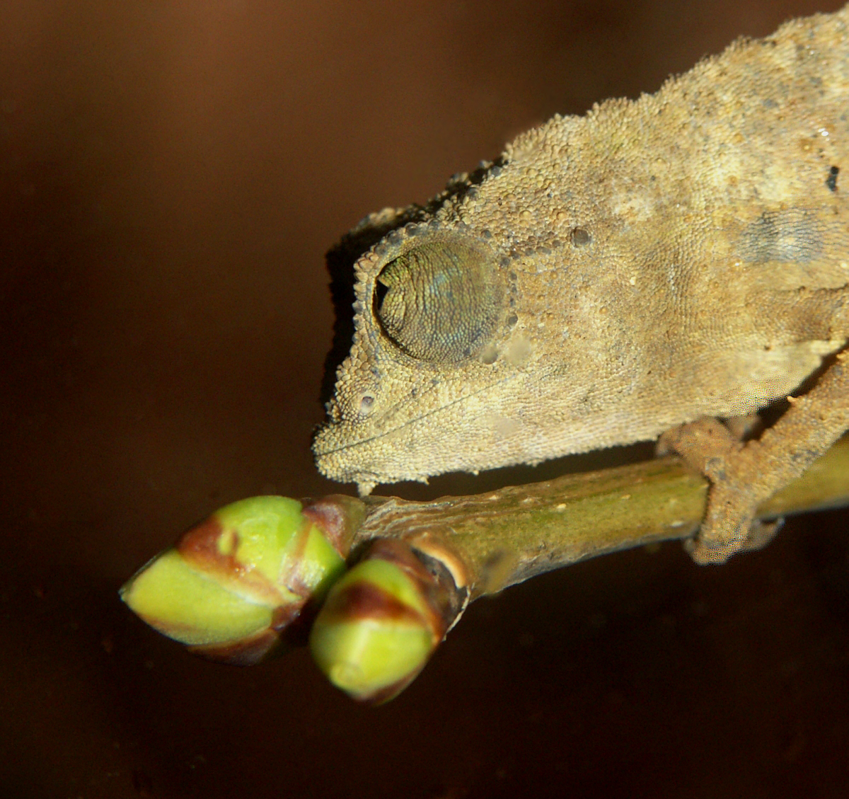 Rieppeleon brevicaudatus male